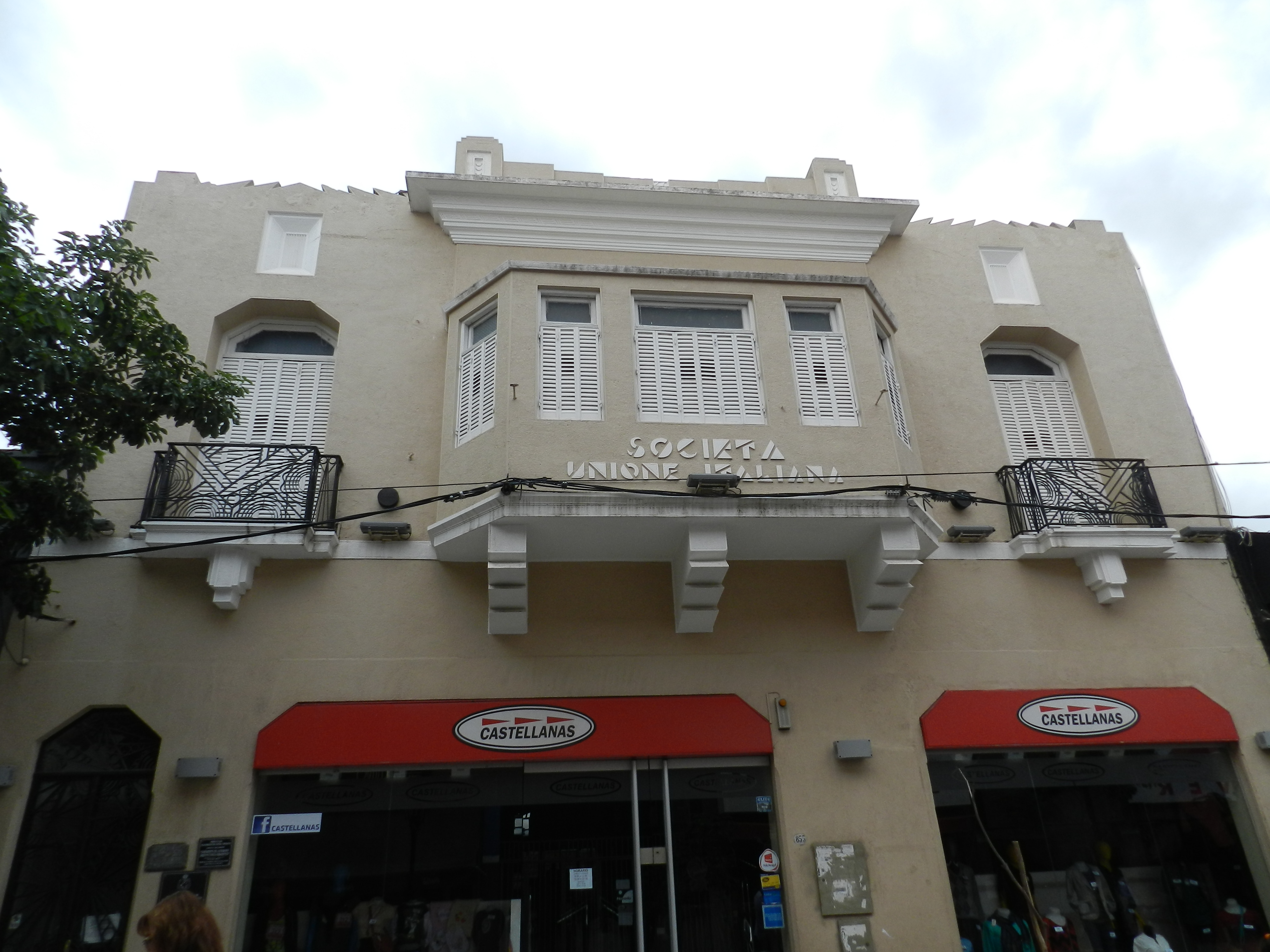 Edificio de la unión italiana de catamarca